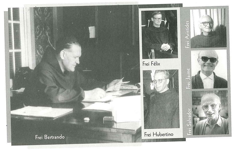 Freis que fazem parte da história do Colégio Santo Antônio